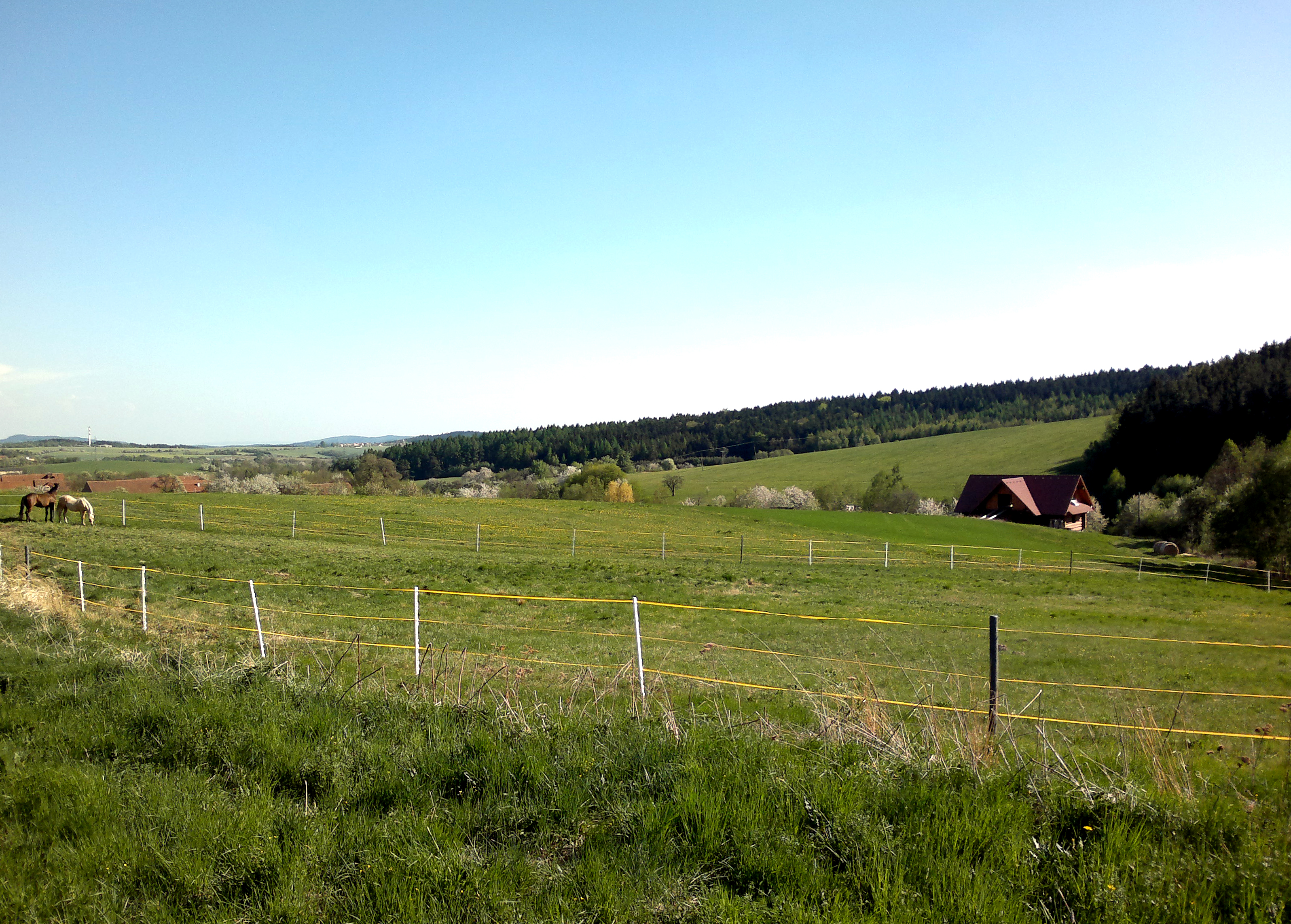 Pohled do okolní krajiny